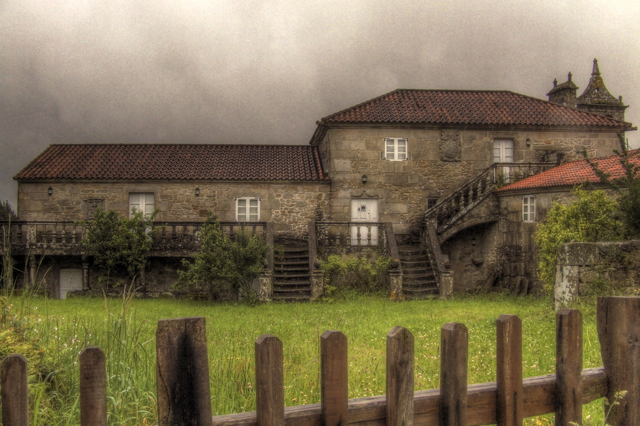 Pazo de Leis, na parroquia do Barro, concello da Baña